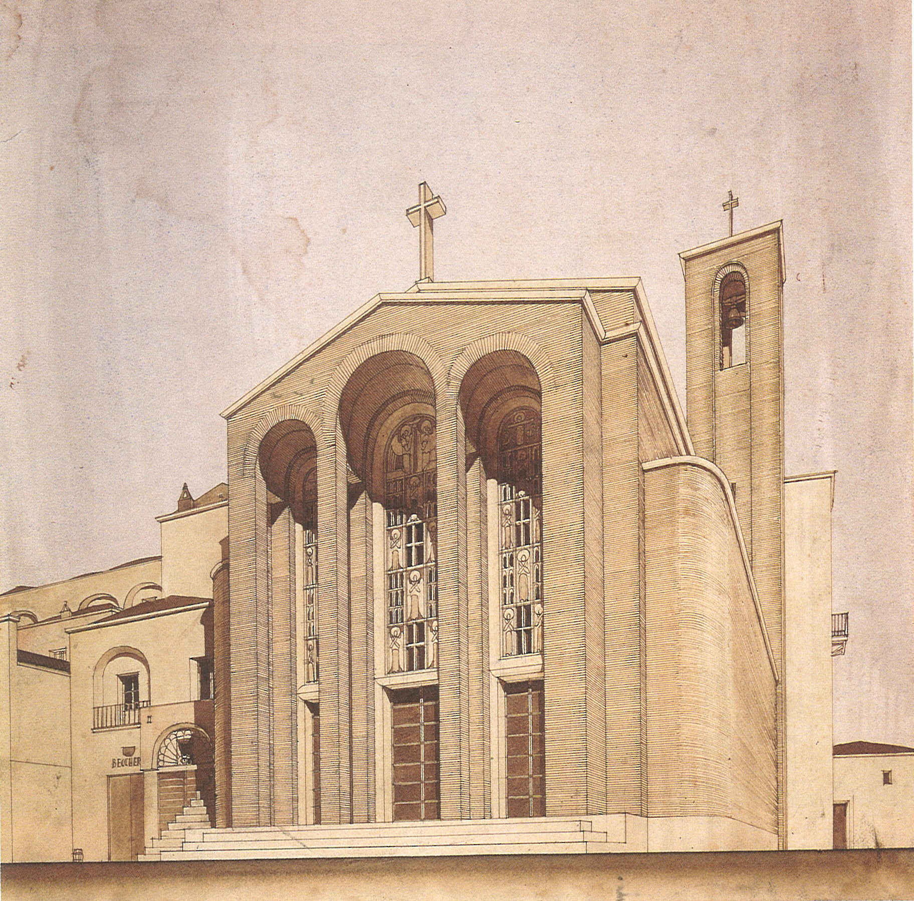 File ricavato dalla fotografia fatta da Bruno Filippo Lapadula del quadro originale conservato nell'Archivio Lapadula di Roma.